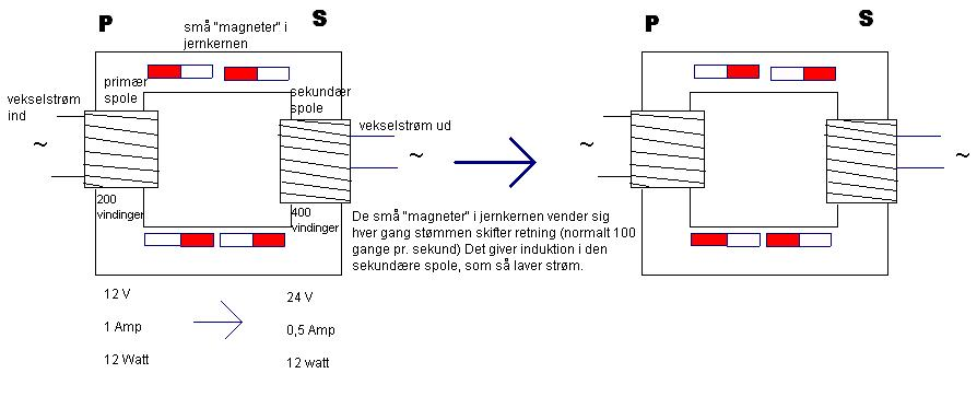 Forenkelt fremstilling af en fiktiv transformaters virkemåde. Til venstre (Primær spole) kommer vekselstrøm ind, i eksemplet er det 12 volt og 1 ampere, det er altså 12 watt. Til højre (sekundær spole) kommer der også vekselstrøm ud, nu er det dog 24 volt og 0,5 ampere, altså stadigvæk 12 watt.